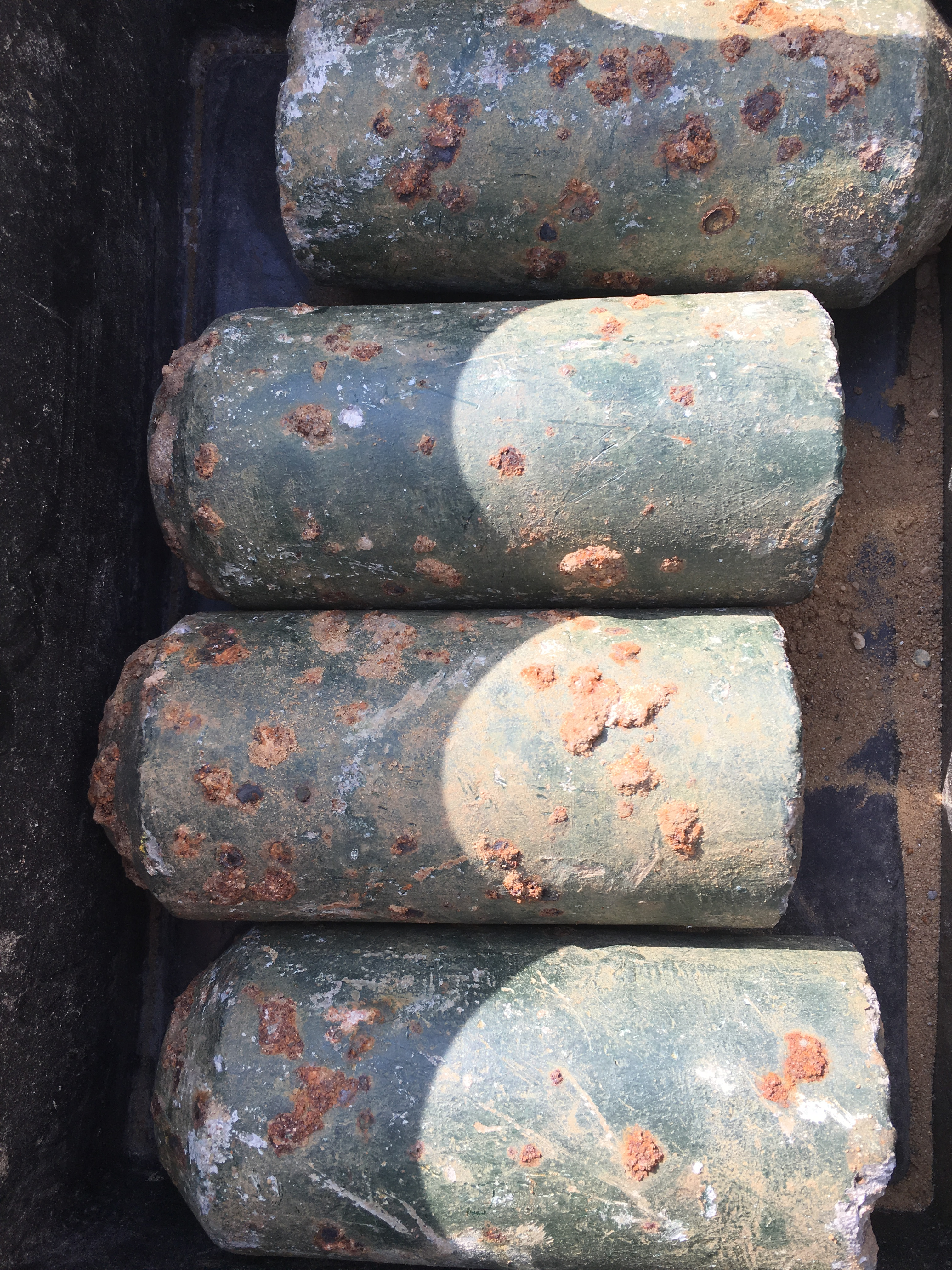 4 tyske stokminer funder under udgravning